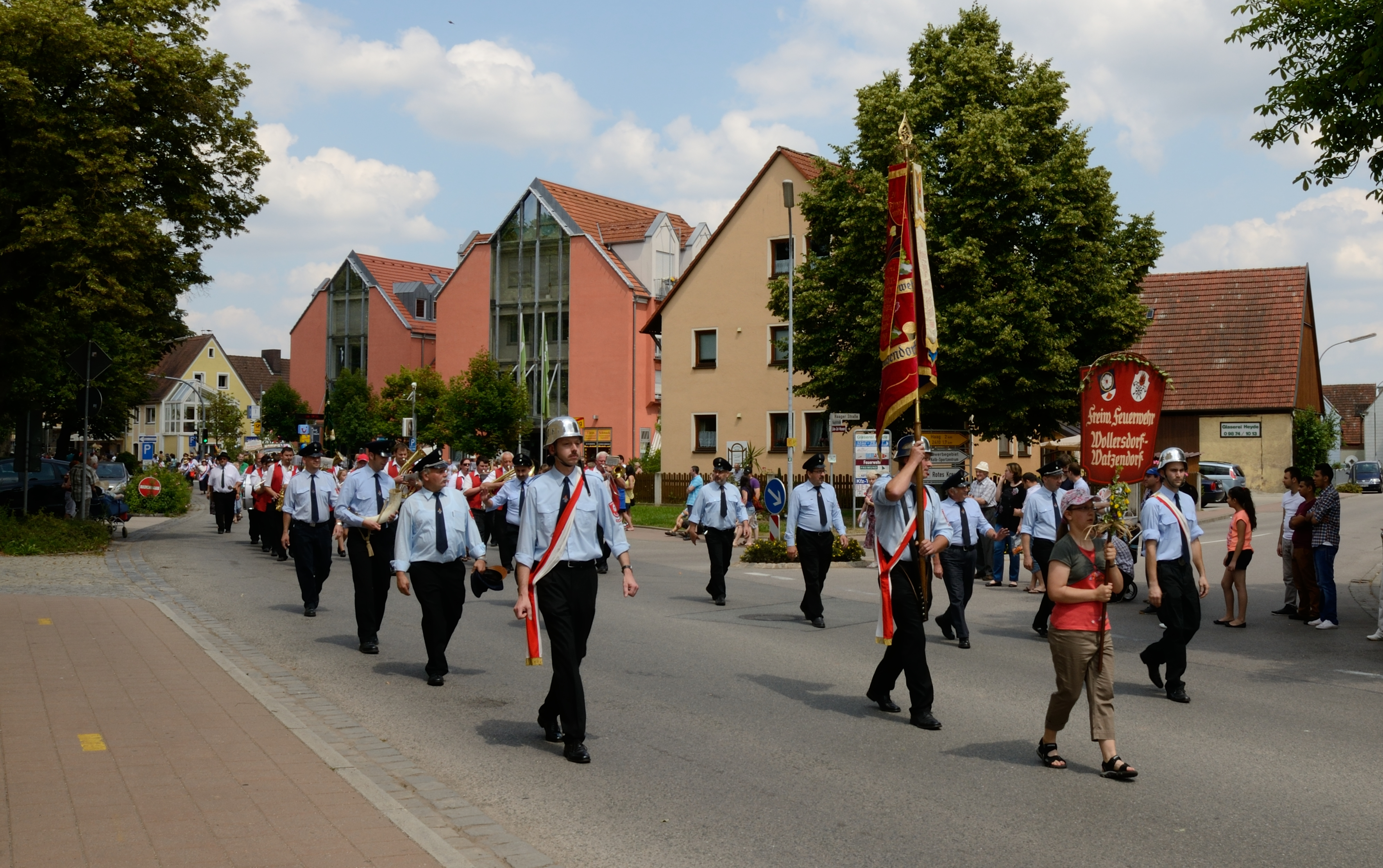 Neuendettelsauer Kirchweih 2013, Festumzug, Freiweillige Feuerwehr Wollersdorf-Watzendorf